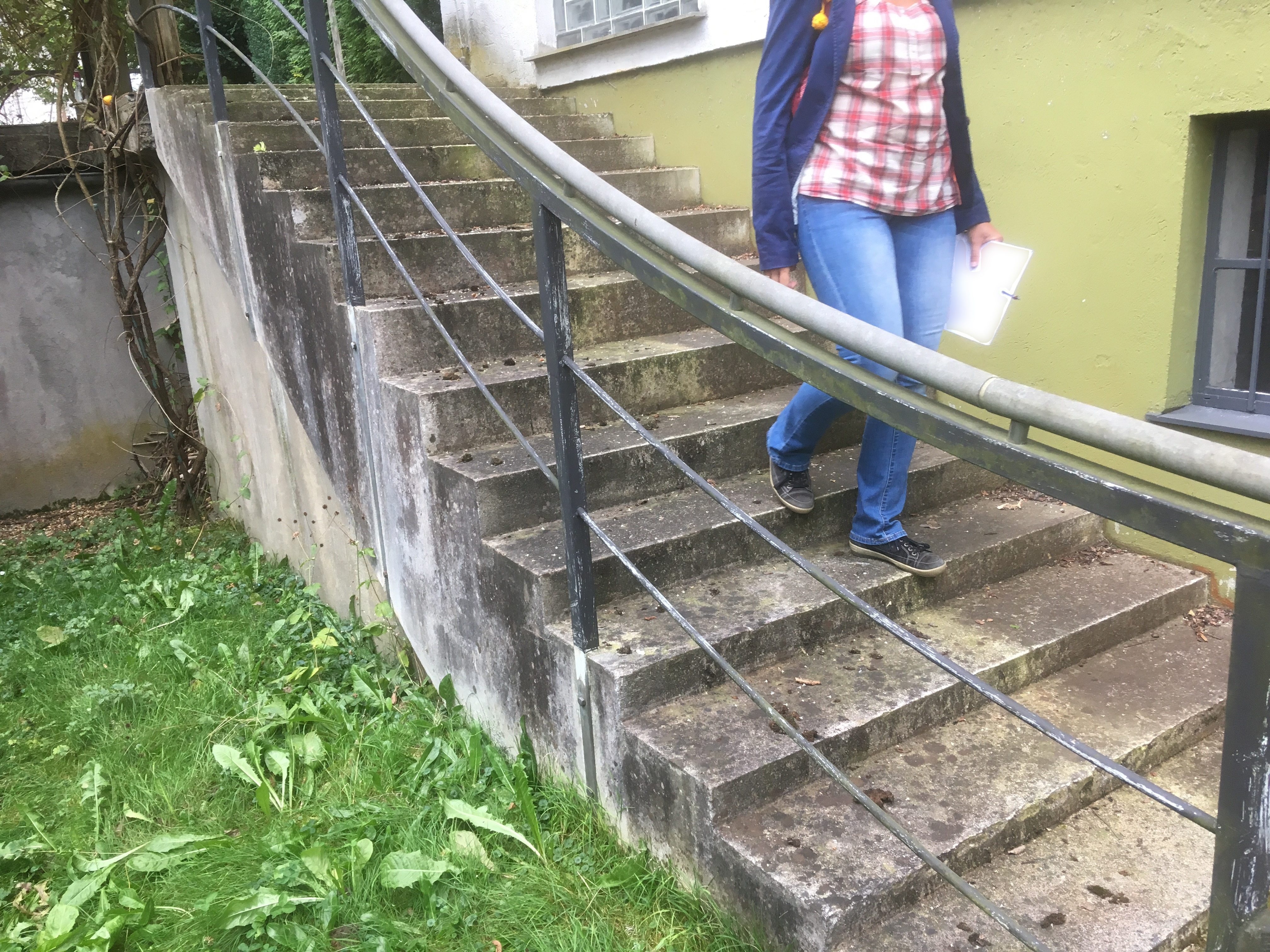 Laurin-Treppe in Benutzung